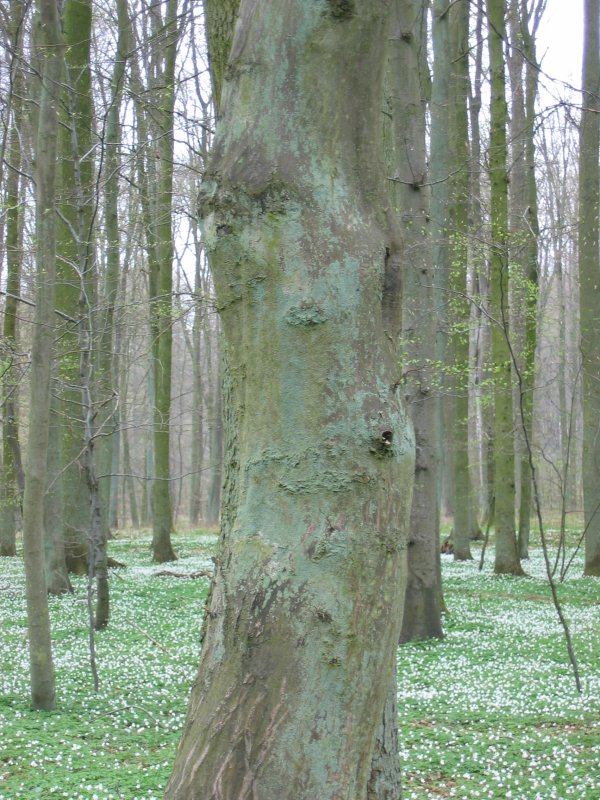 Stamm der Hainbuche Carpinus betulus, Pölchow bei Rostock